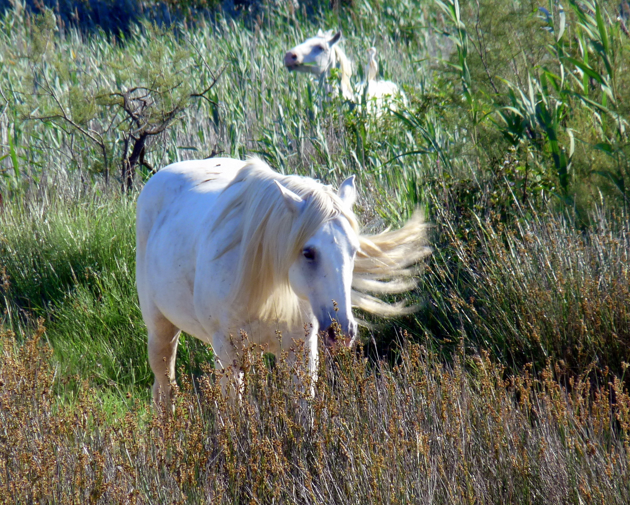 Camargue